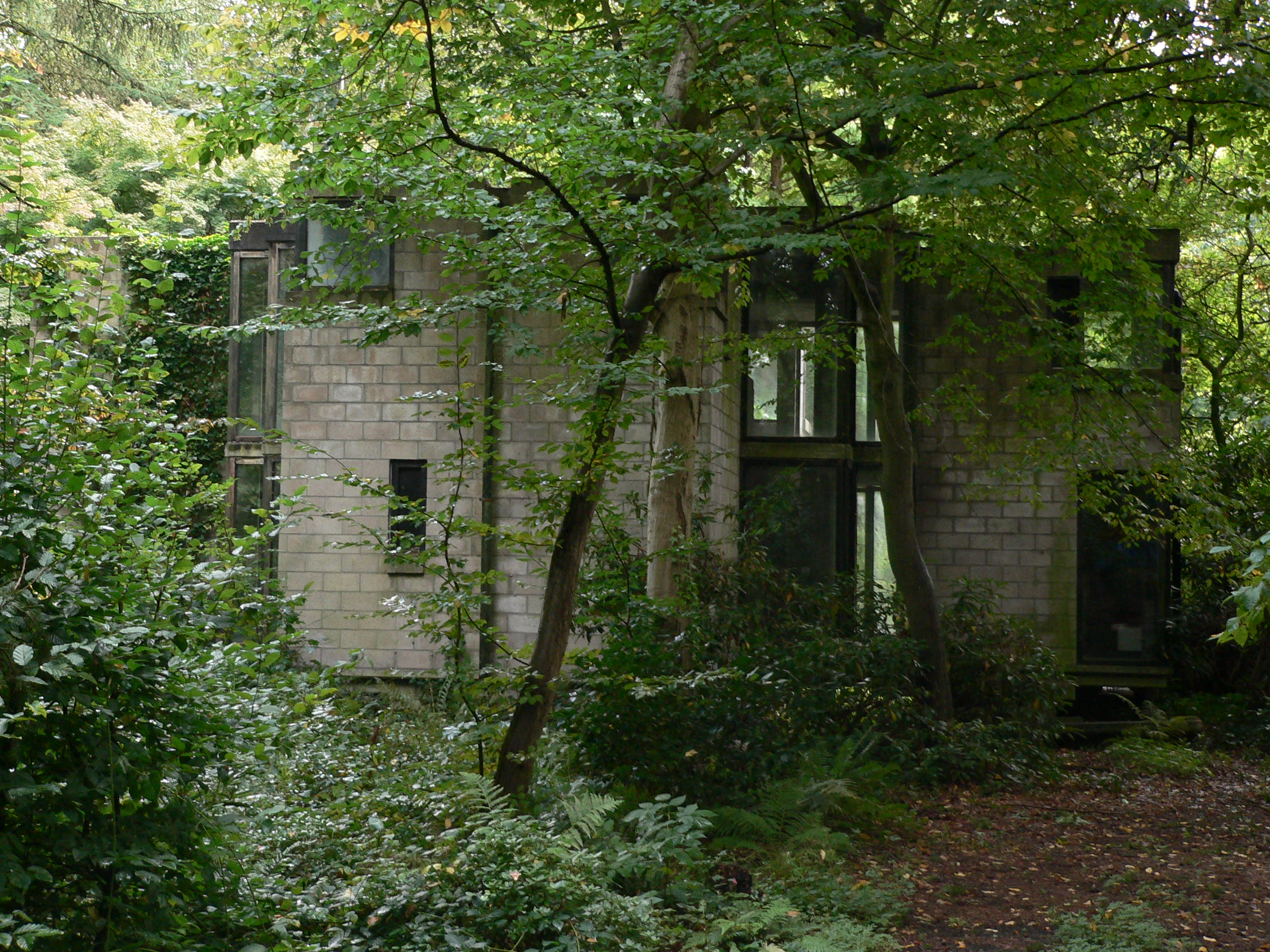 Gevel van de woning van architect M. Dessauvage. De woning zweeft boven de grond en verschillende vijvers lopen onder de hoeken door. Een van de kapellen in de nabijgelegen Sint-Andriesabdij van Zevenkerken is van de hand van M. Dessauvage.